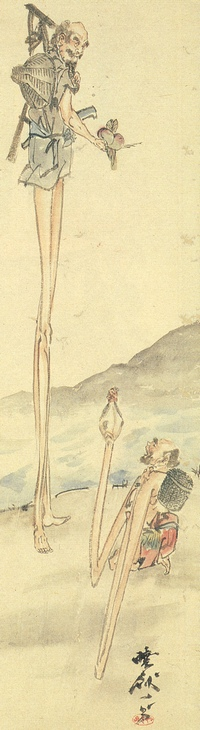 Tenaga-Ashinaga (手長足長)